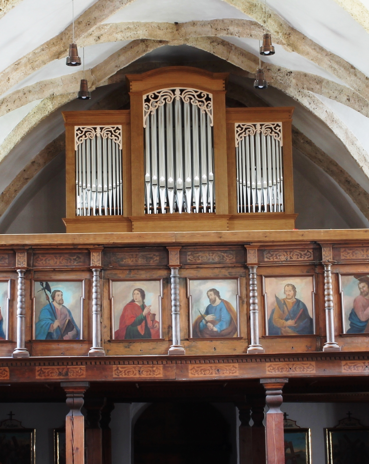 Alois Linder Orgel Faistenau 18 Register mechanisch